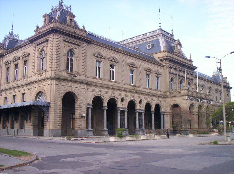 Estación Central de ferrocarriles "General Artigas" en Montevideo, Uruguay